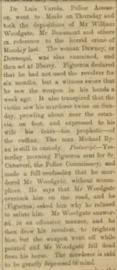 fragmento del periódico The Standard and River Plate News, donde se menciona al comisario Canaveri.